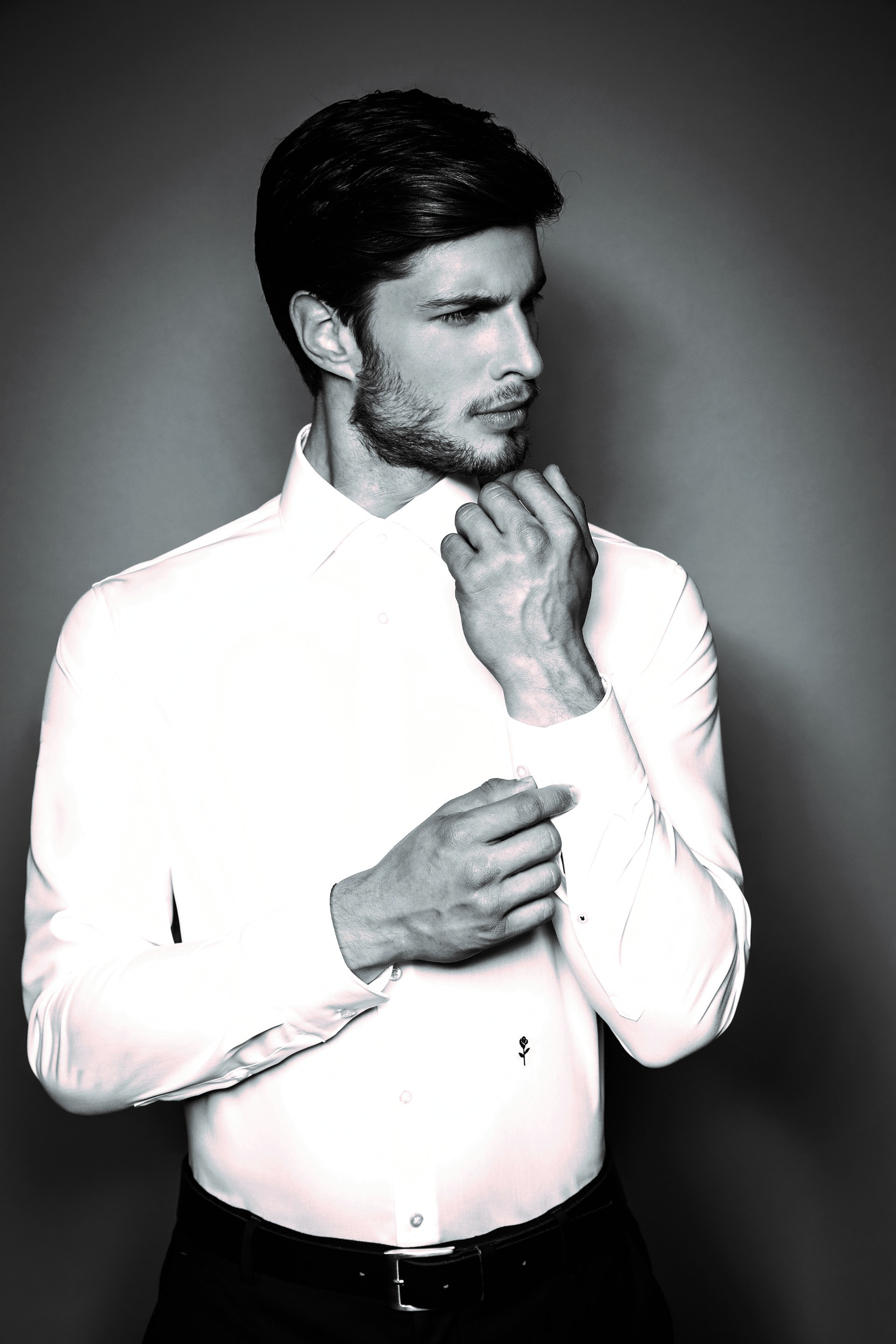 Schwarze Rose Hemd